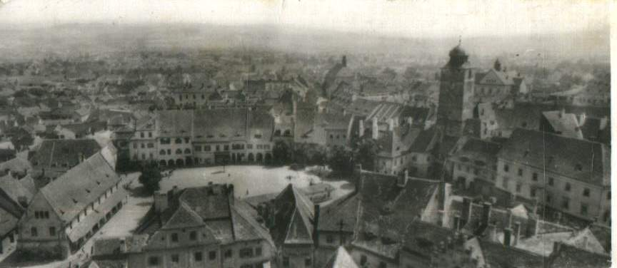 Centru - vedere panoramică. Imagine realizată din Biserica Evanghelică